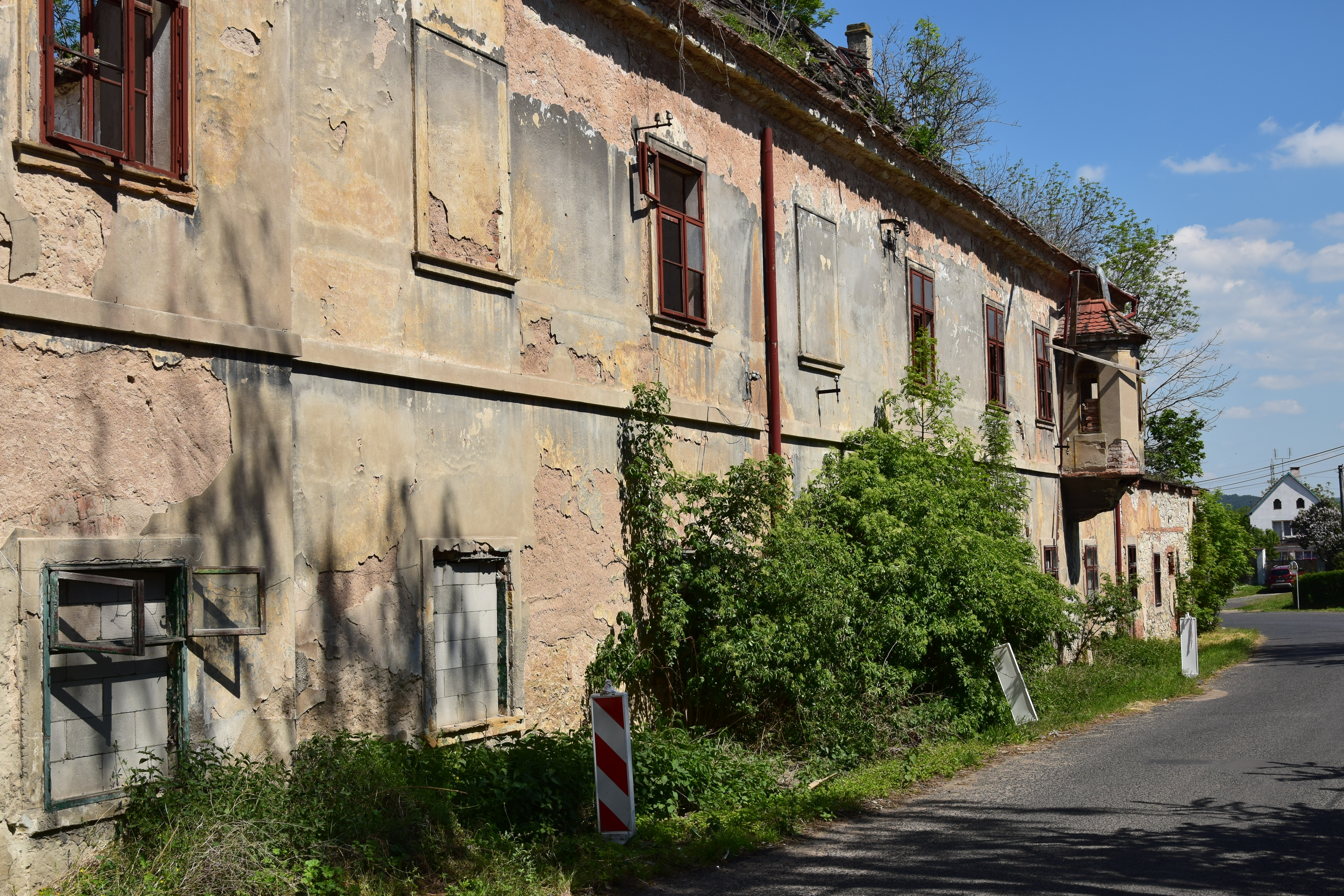 Zámek Dobříčany – východní část hlavního křídla